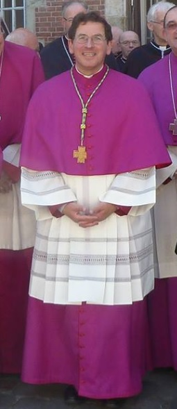 Lode Aerts, h Bloed